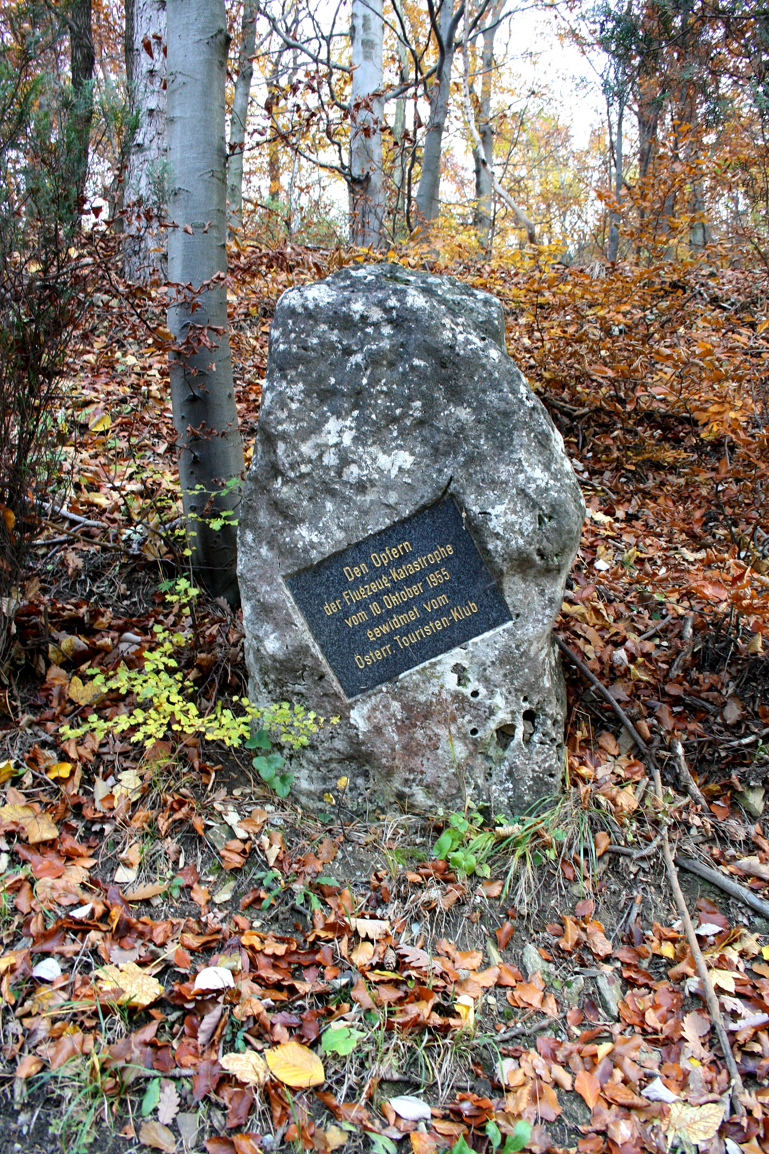 Gedenkstein zwischen dem Kahlenberg und Leopoldsberg an der Grenze zwischen Wien und Klosterneuburg für die Opfer des Flugzeugabsturzes im Jahr 1955 an dieser Stelle.